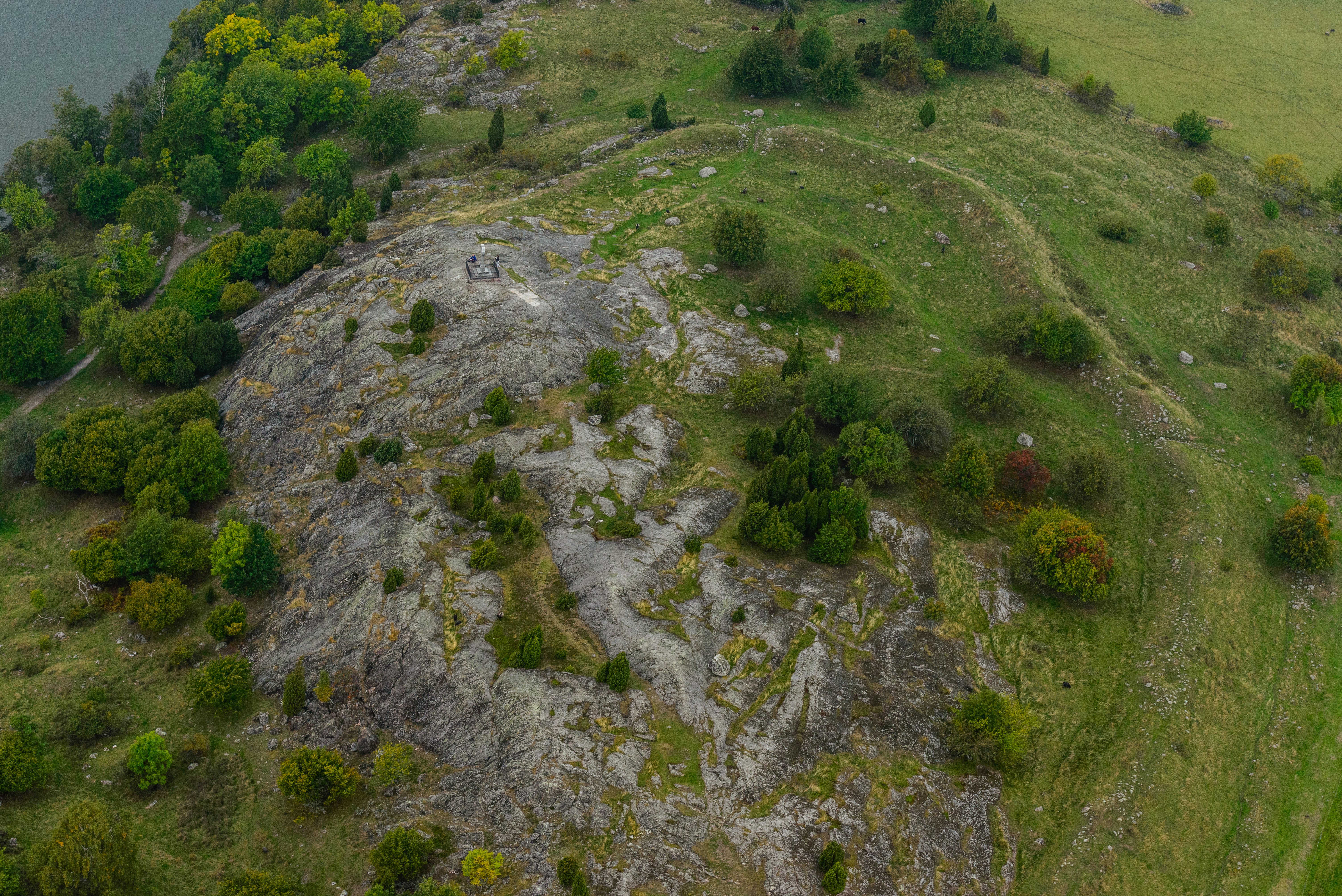 Borgberget med Birkaborgen.